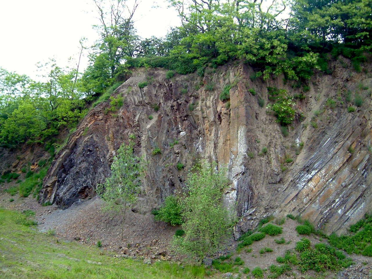 Faltung in Tonsteinen des tiefen Oberkarbons, Ziegeleigrube Vorhalle, Hagen-Vorhalle